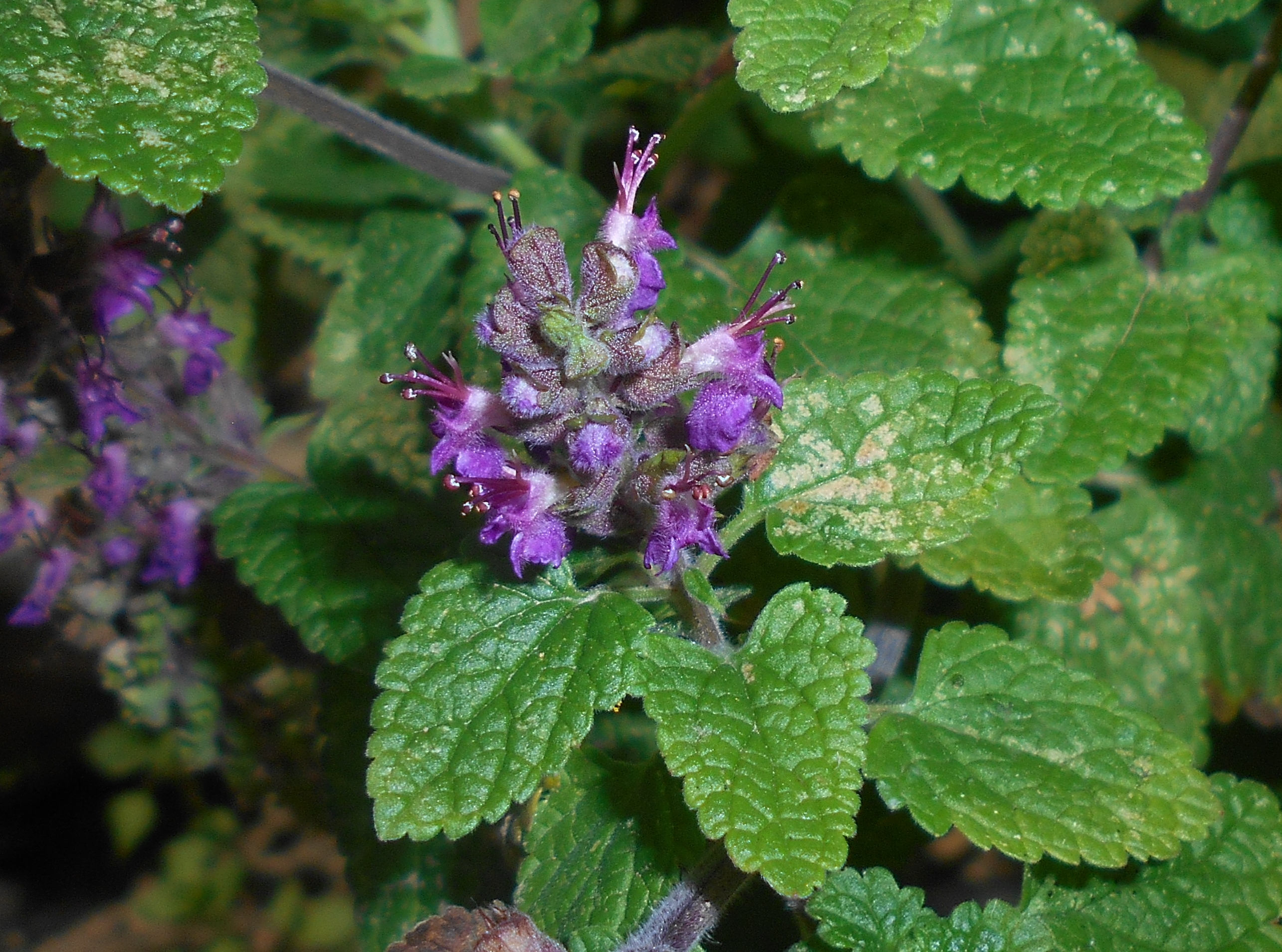 Ożanka kaspijska (Teucrium hircanicum), Ogród Botaniczny UMCS w Lublinie.